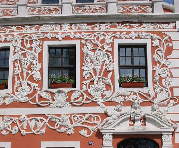 Historische Altstadt Luckau, renovierte Fassade. Brandenburg.